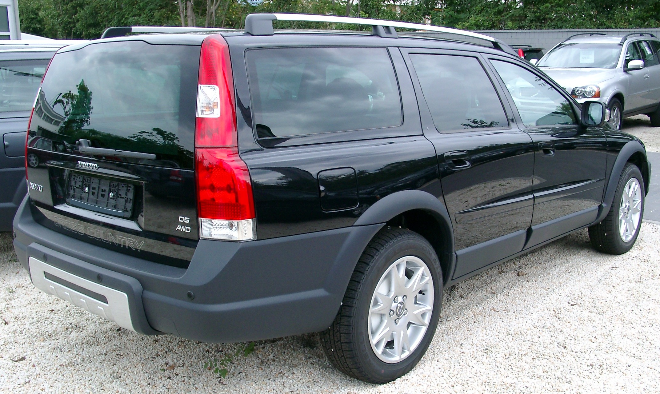 Volvo XC 70